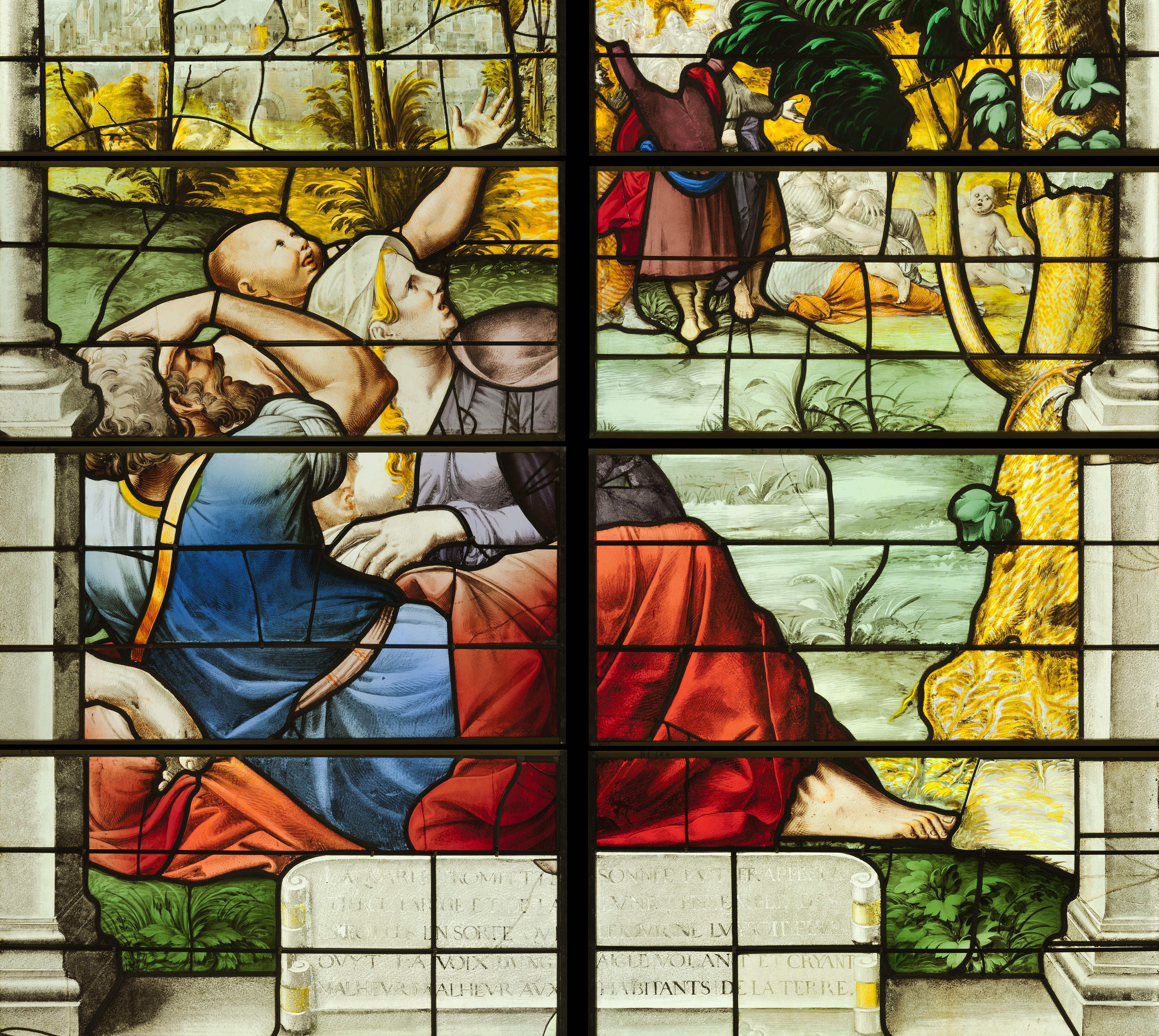 Montage présentant un détail du registre inférieur de la baie 1 de l'abside.